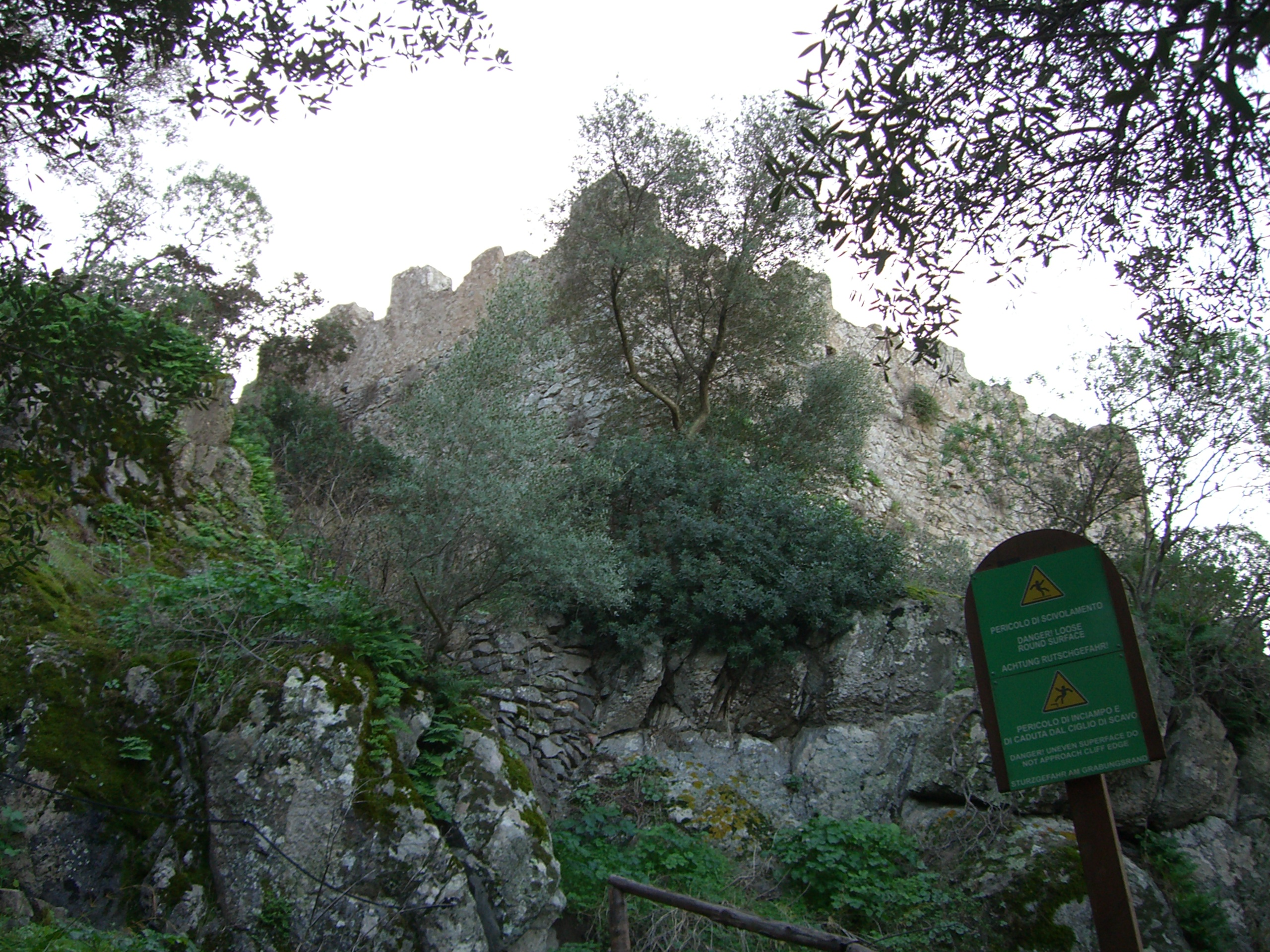 Merlature del castello di Acquafredda (CA)